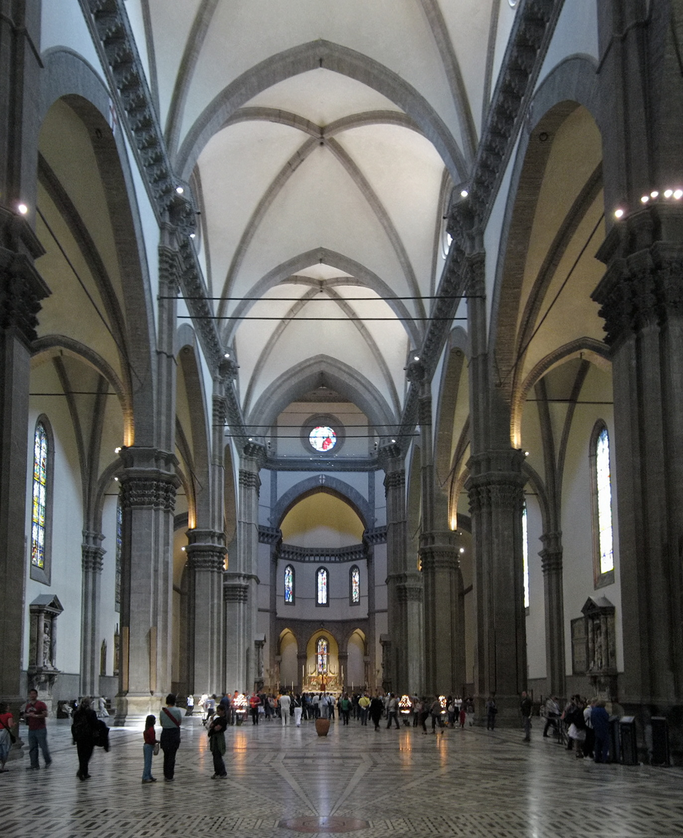 Inside Santa Maria del Fiore (Florence)